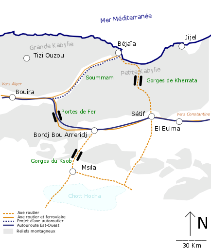 Algérie : voies de communication ferroviaires, routières et maritimes de Béjaïa.